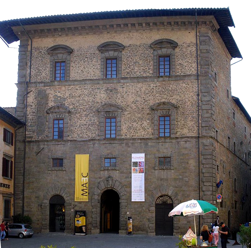 Palazzo Casali, sede do Museu da Academia Etrusca e da Cidade de Cortona